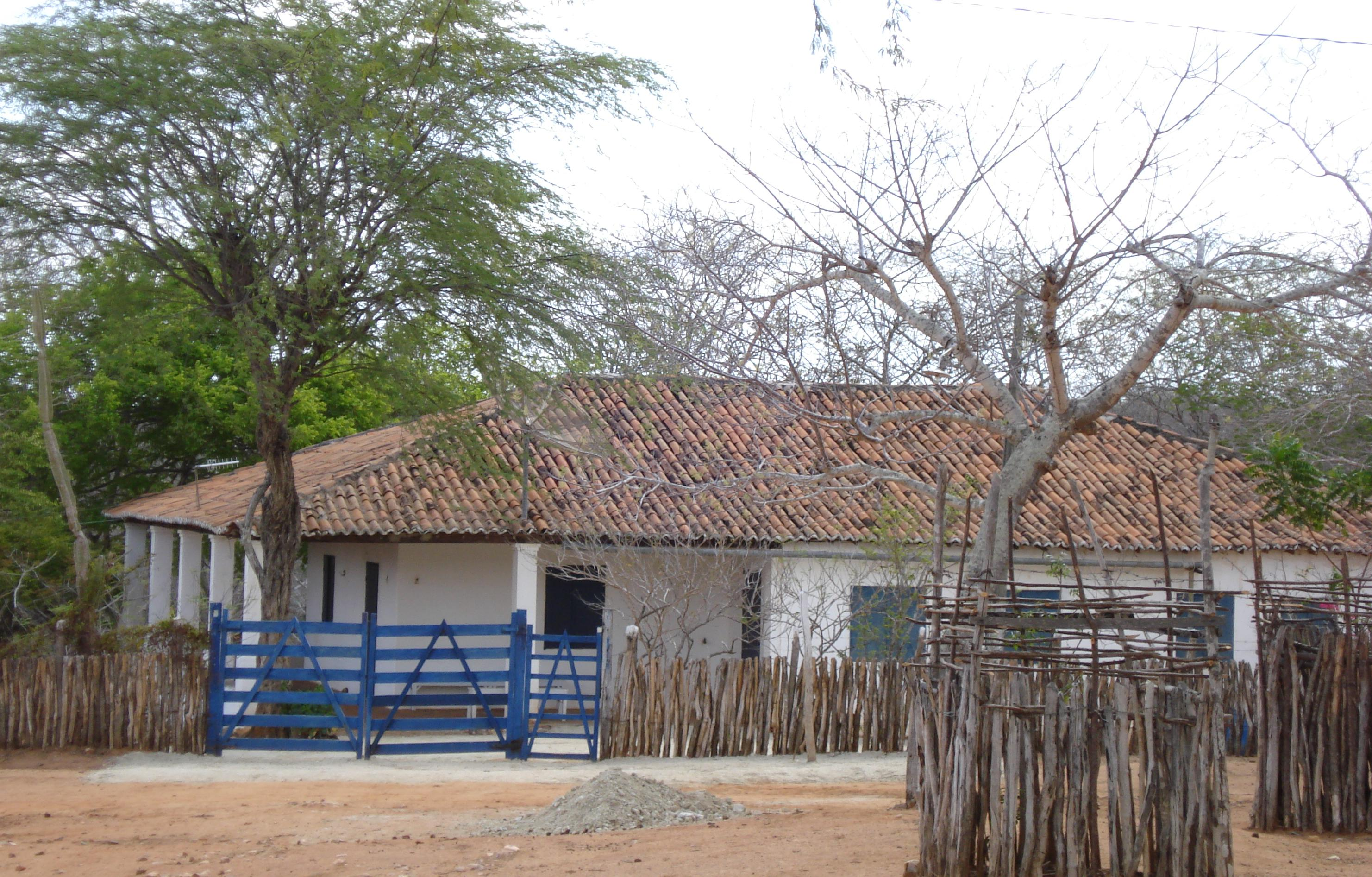 Sede da Fazenda Não Me Deixes em Quixadá, Ceará, Brasil.